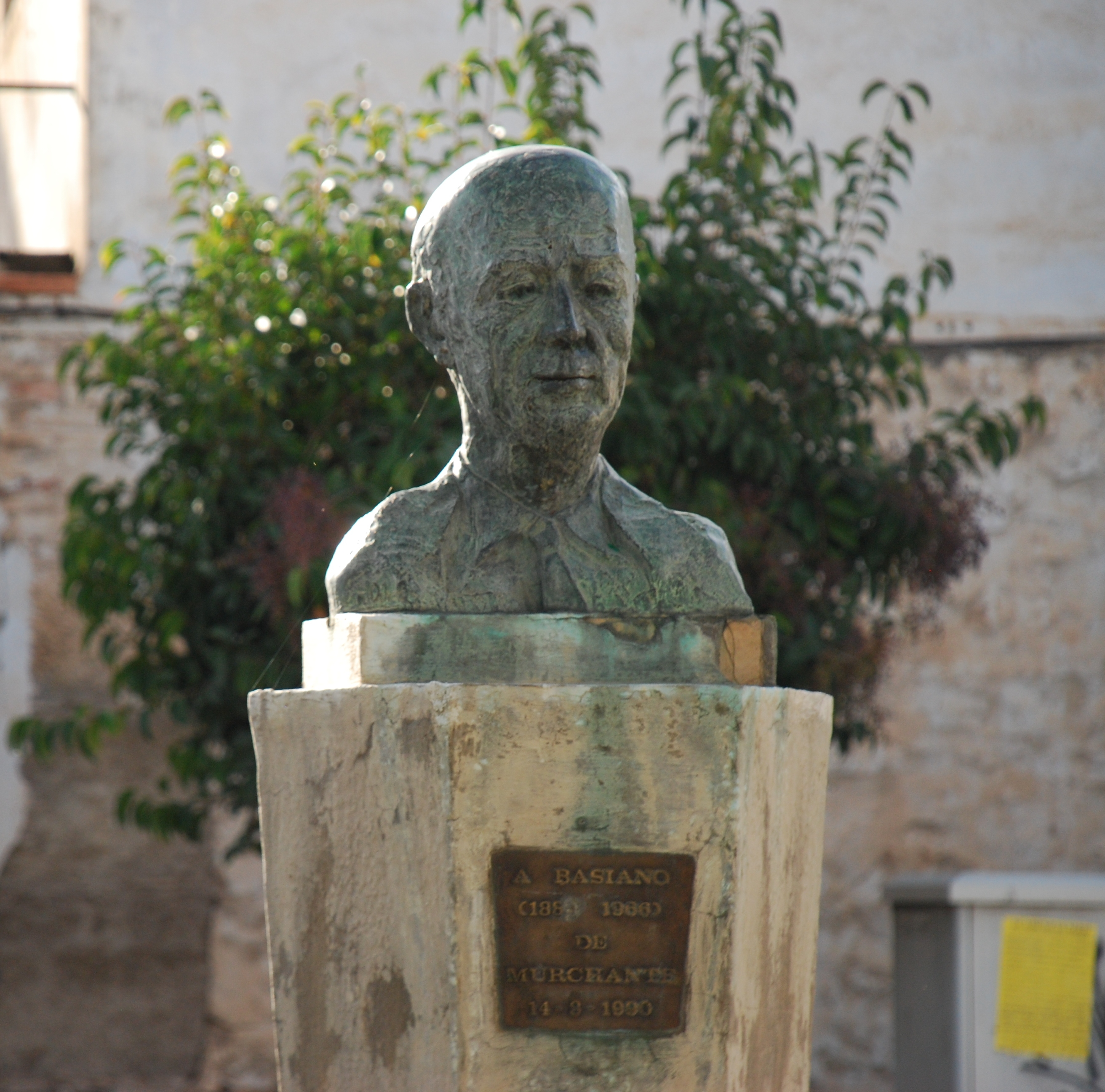 Busto Basiano en Murchante